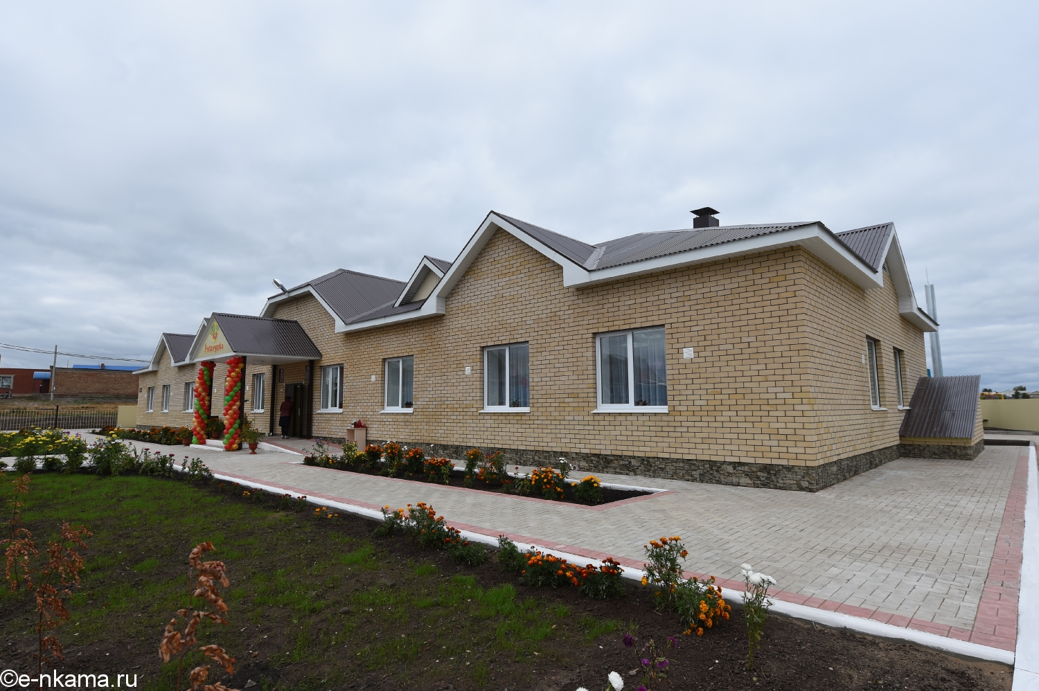 Рябинушка